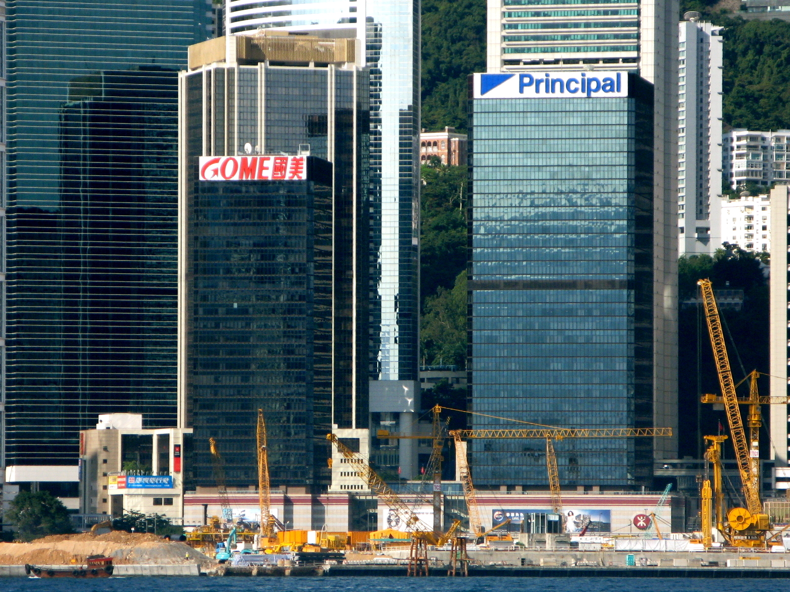 海富中心 Admiralty Centre